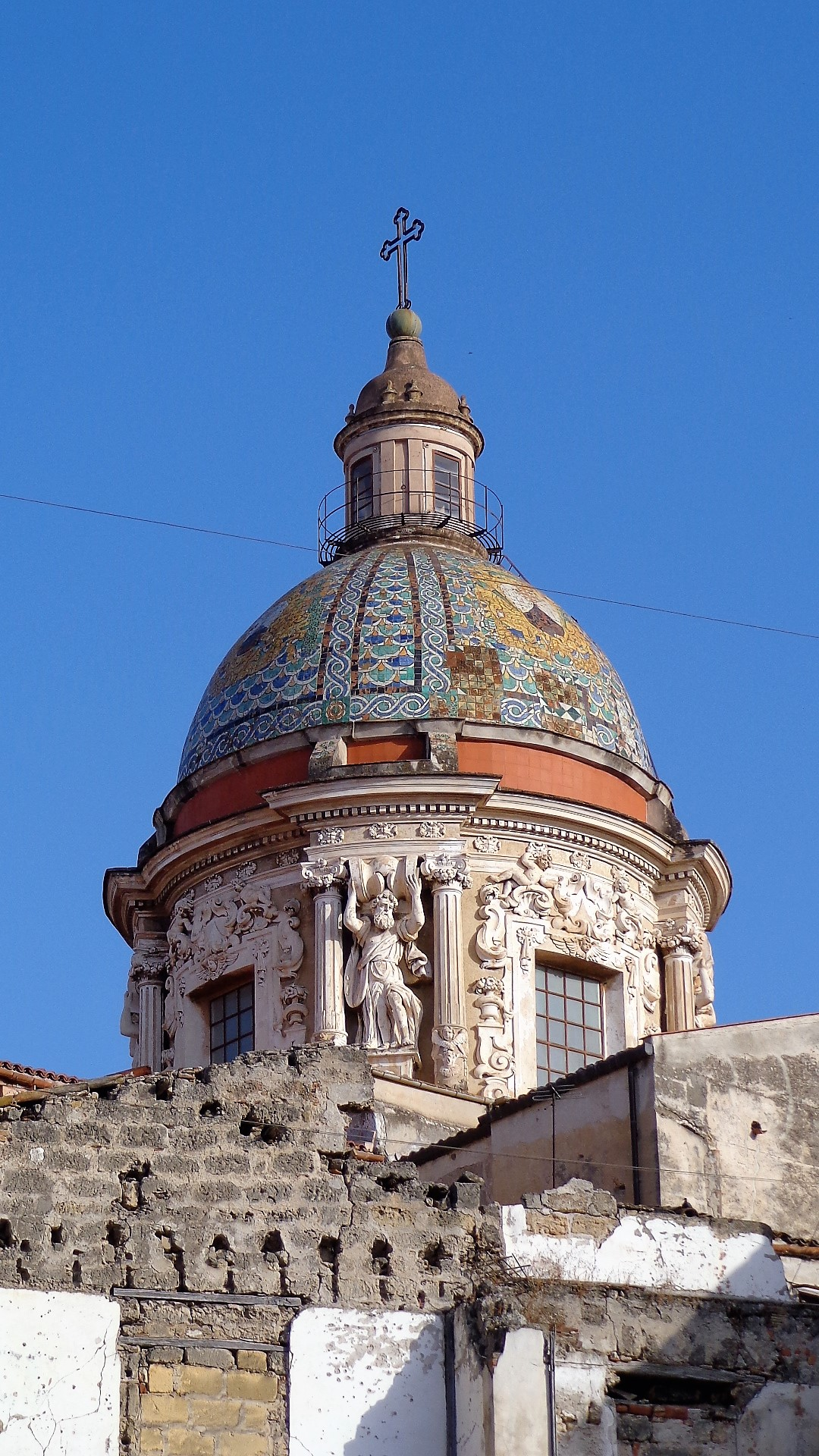 Carmine cupola